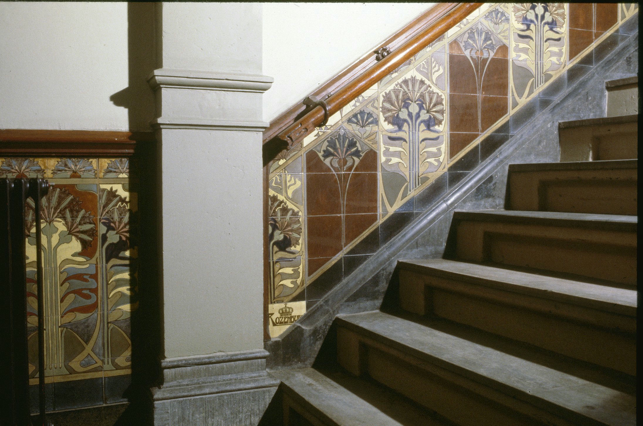 VOORMALIGE RIJKSPOSTSPAARBANK: INTERIEUR, GANG, TRAP, TEGELTABLEAUS IN JUGENDSTIL